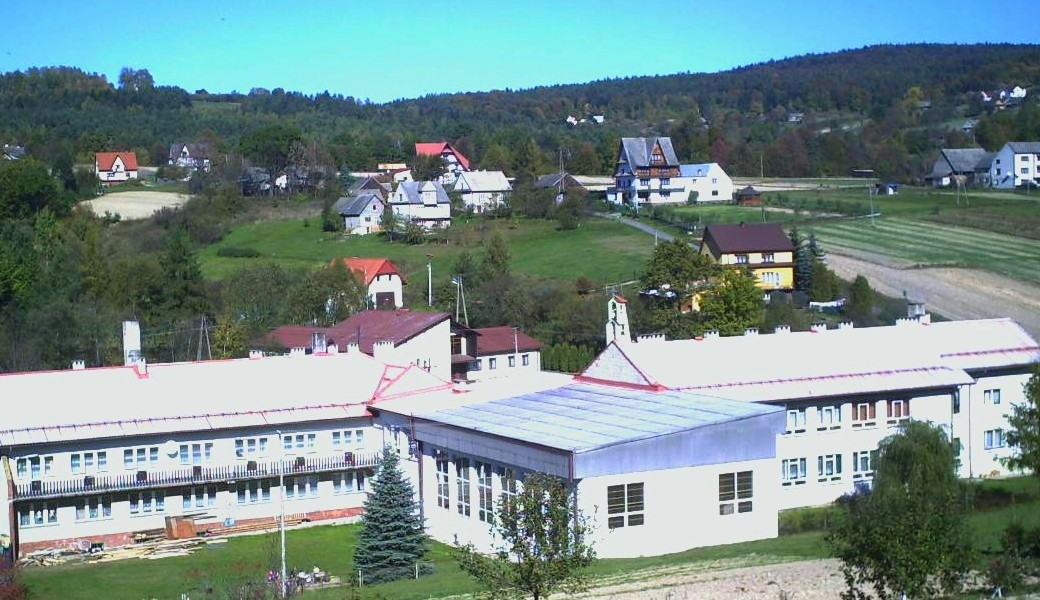 Marcówka Szkoła Podstawowa.My own work.2006.Suwaj Władysław.(Primary school)